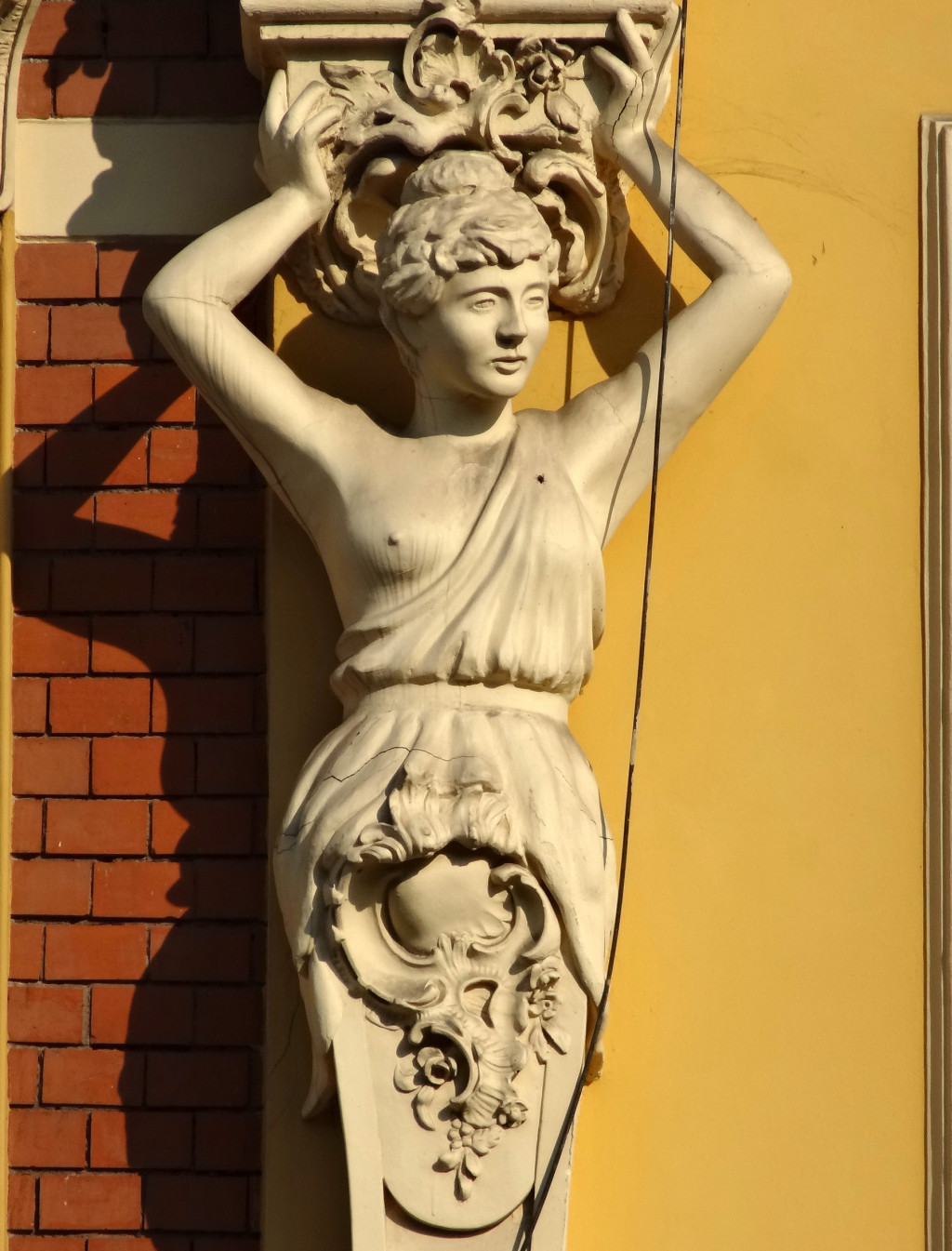 Kamienica przy ul. Gdańskiej 101 w Bydgoszczy (1892-1893, aut. Józef Święcicki)